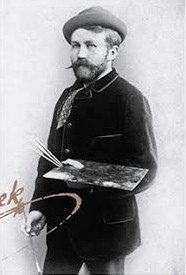 Malíř Jan Prousek